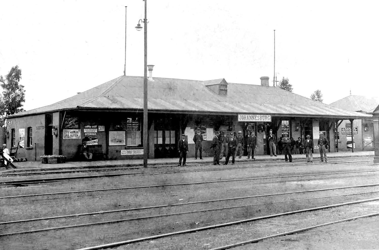 Old Johannesburg Station, later Braamfontein